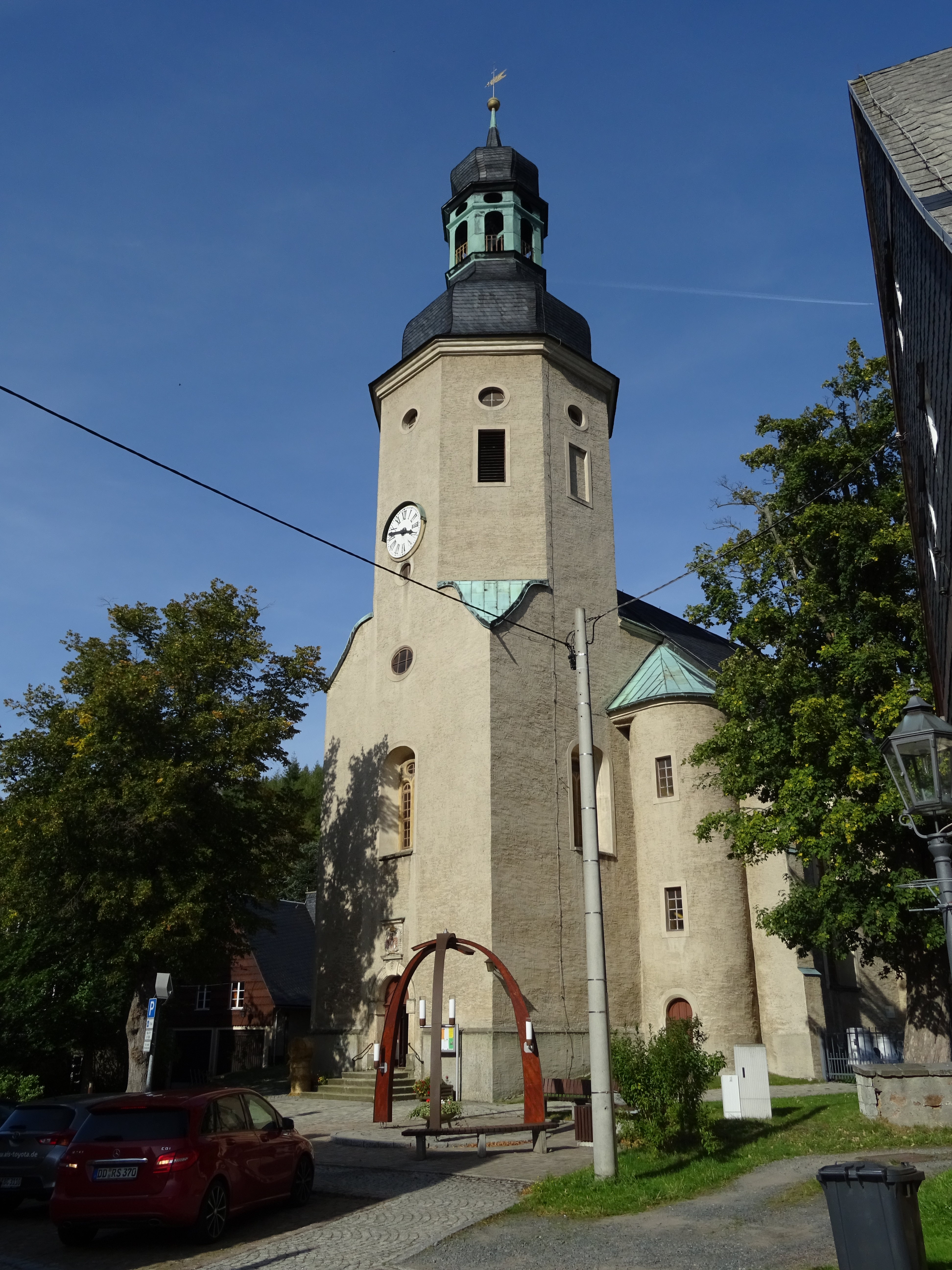 Geising: die evangelisch-lutherische Stadtkirche, Schon seit dem 15. Jahrhundert befindet sich am Ort der Geisinger Kirche eine Pfarrkirche. 1689 wurde sie als barocke, schlichte Hallenkirche mit dreistöckigen Emporen neu erbaut.